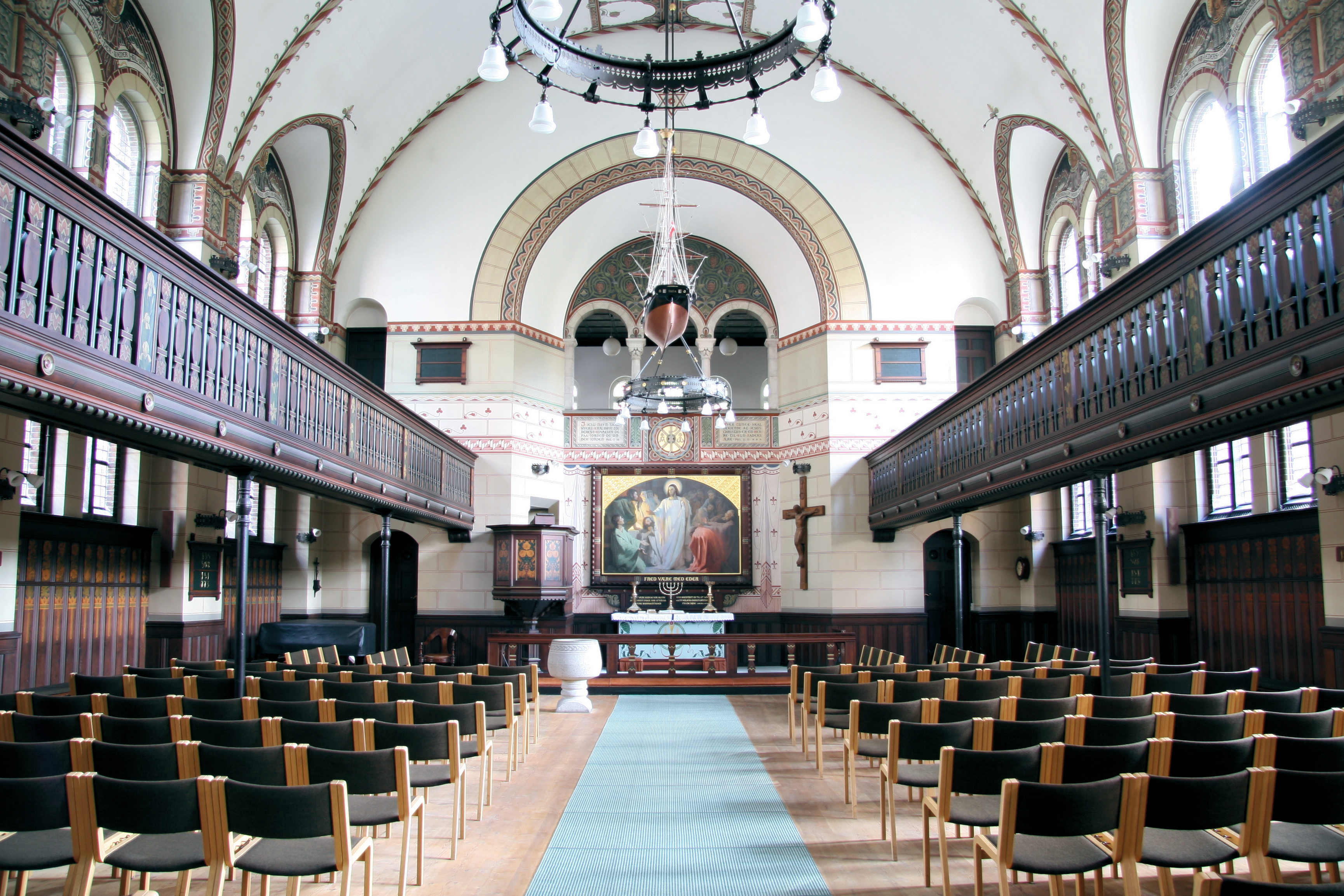 Sankt Lukas Kirke in Copenhagen, Denmark. Interior.